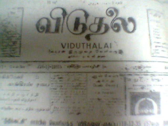 விடுதலை (இதழ்)